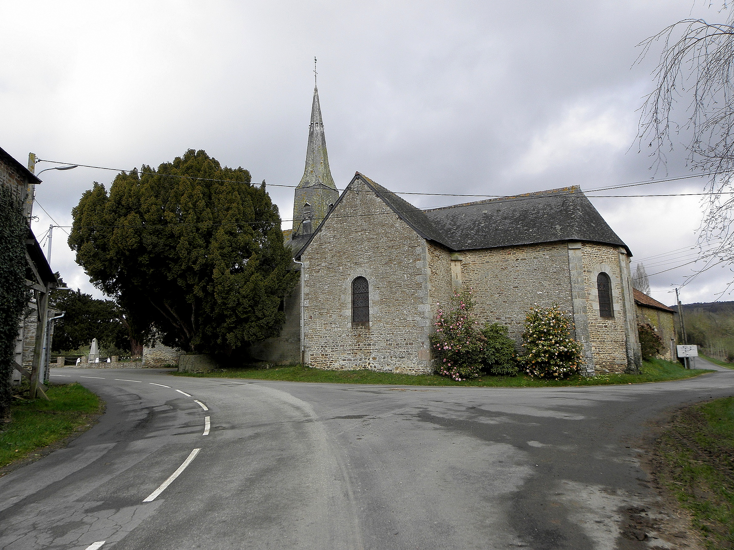 Église Sainte-Marie de Boulay-les-Ifs (53). Vue méridionale.